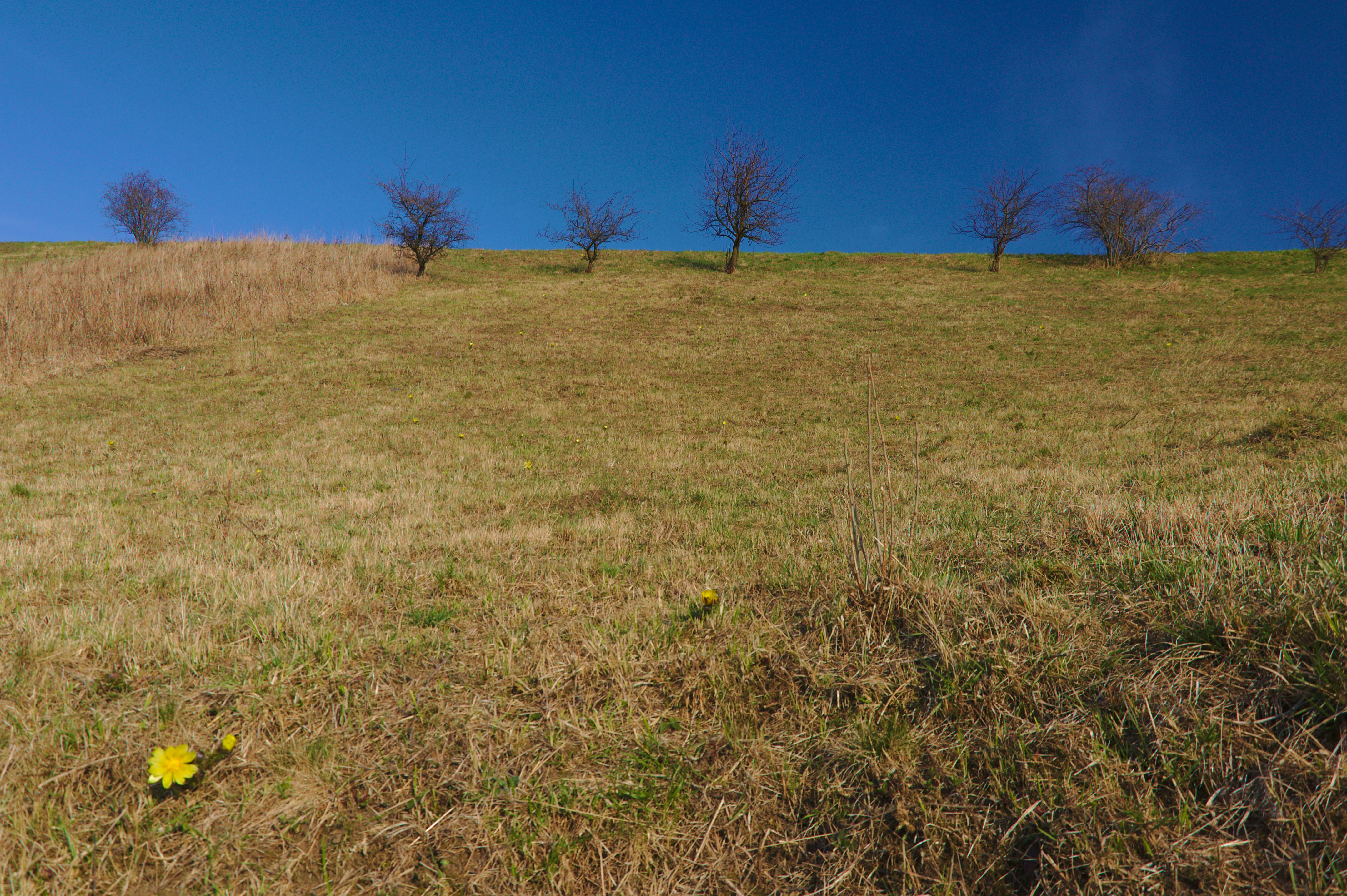 Národní přírodní památka Na Adamcích, okres Hodonín